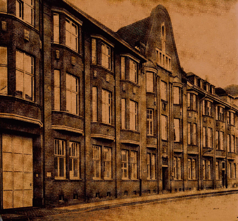 125 Jahre G. Hollender Söhne, Krefeld. Fabrikations- und Verwaltungsgebäude auf der Wagenhofstraße.